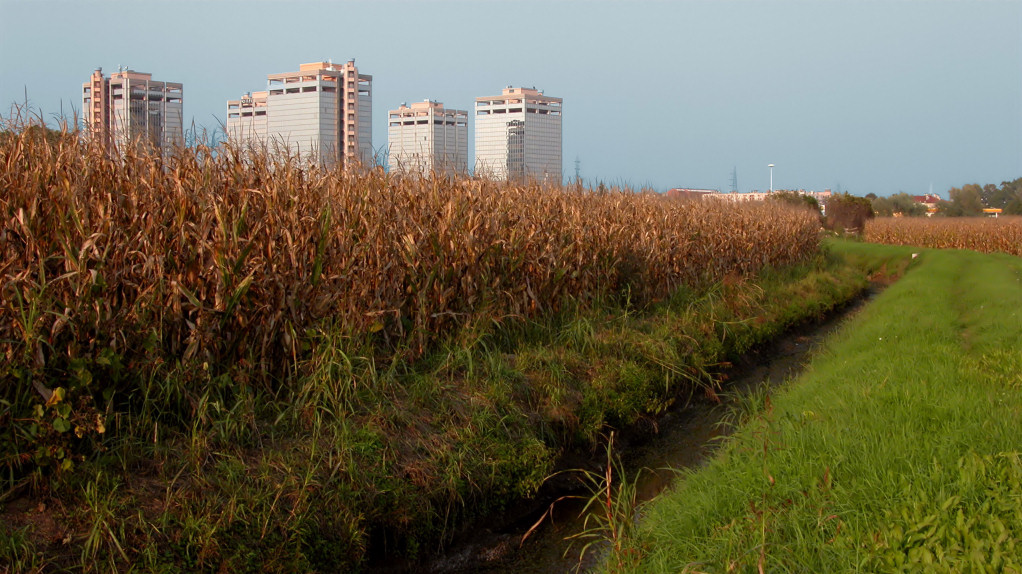 Vista dal Parco Agricolo Sud Milano verso Milano. Foto scattata da Stefano Trezzi (Utente:Yoruno) e da me licenziata secondo la licenza sotto indicata.